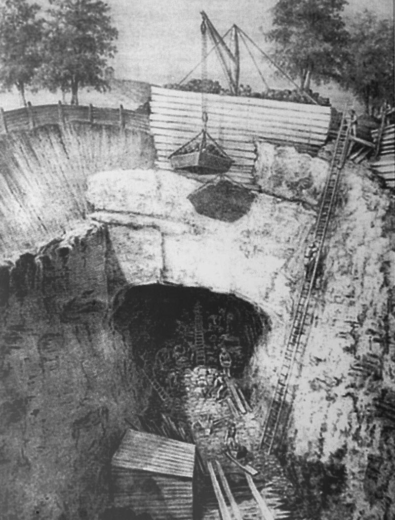 Den första Nyboda tunnel byggs 1858, Ny Illustrerad Tidning